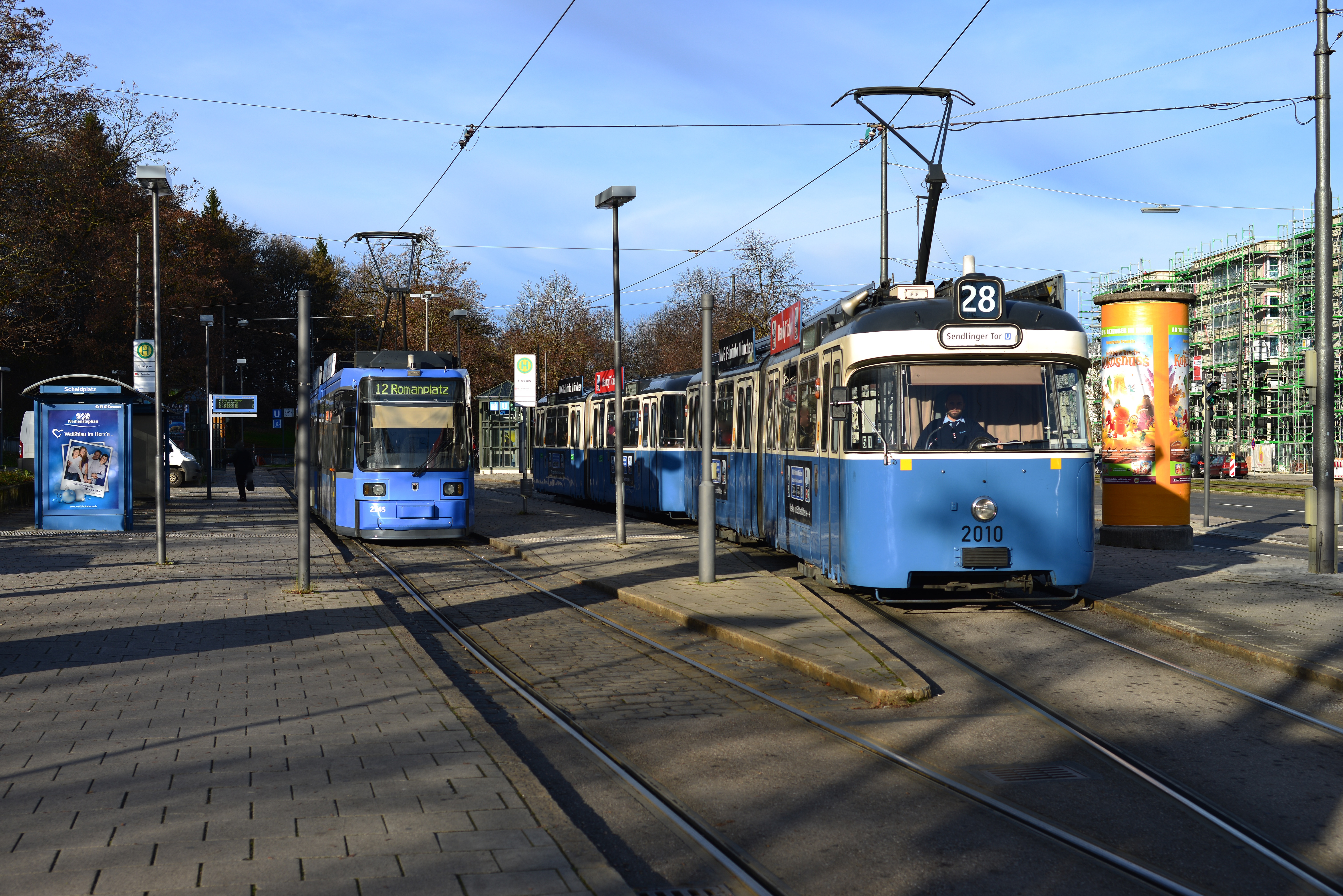 München, Schwabing. Trambahnhaltestelle Scheidplatz. Die Linie 12 wartet auf die Rückfahrt zum Romanplatz. Und ein P-Wagen unterwegs auf der Linie 28 tritt seine Rückfahrt zum Sendlinger Tor an.